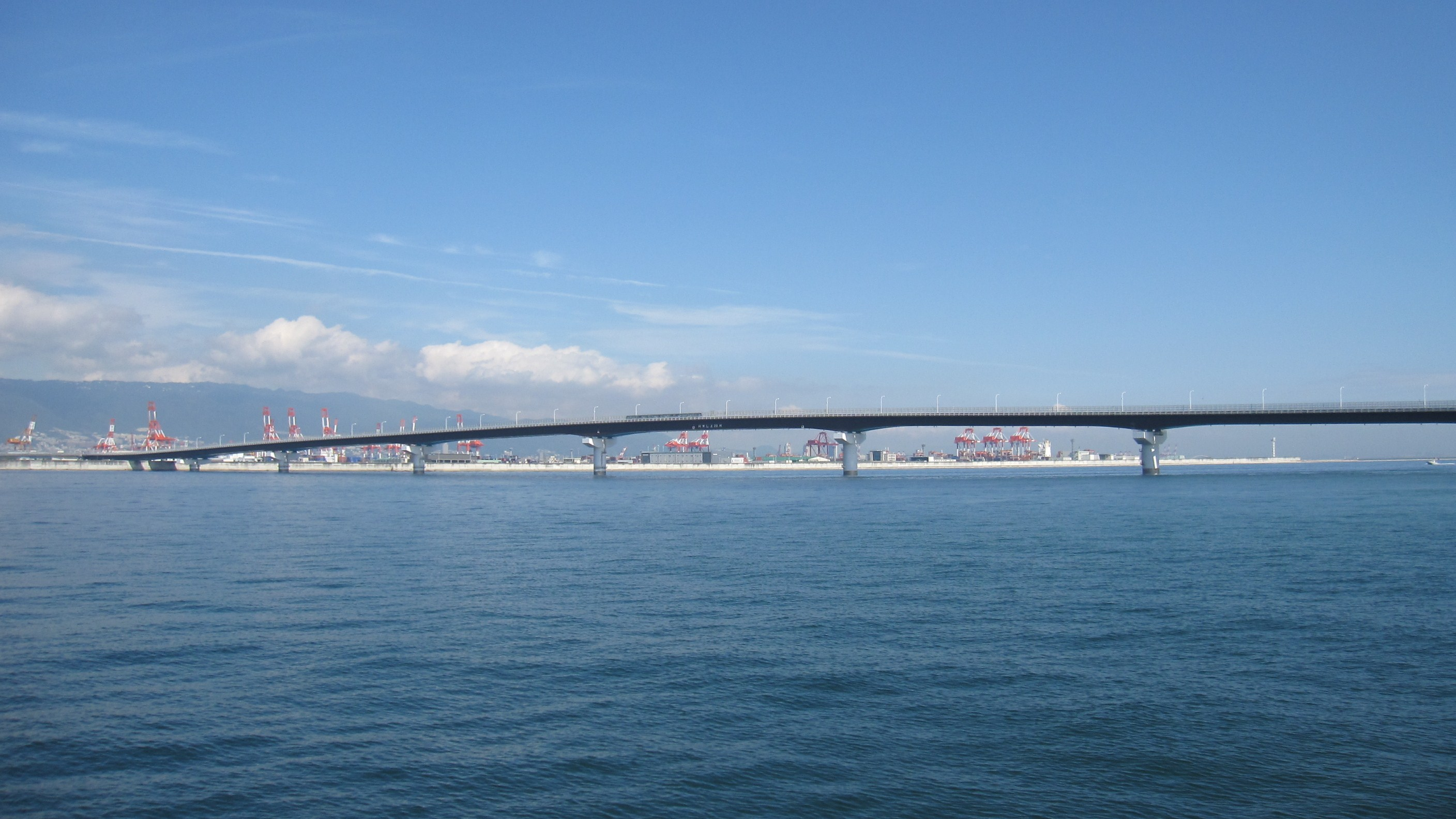 神戸スカイブリッジ